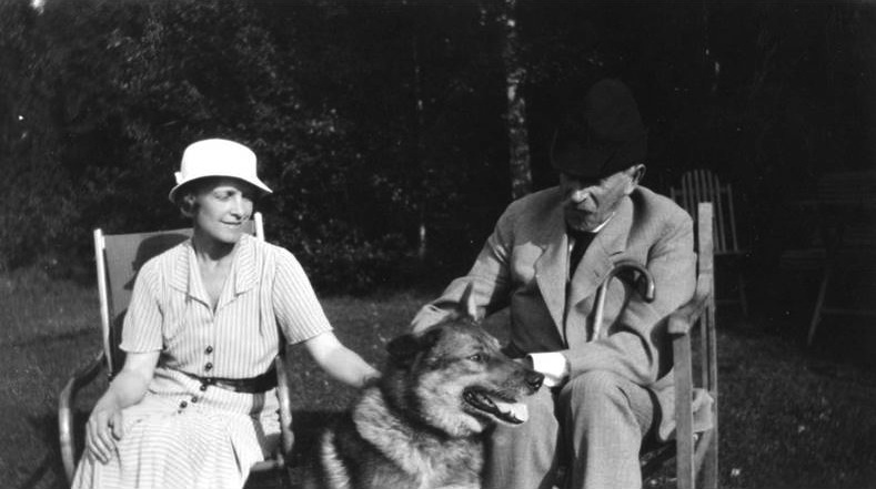 Fotografi